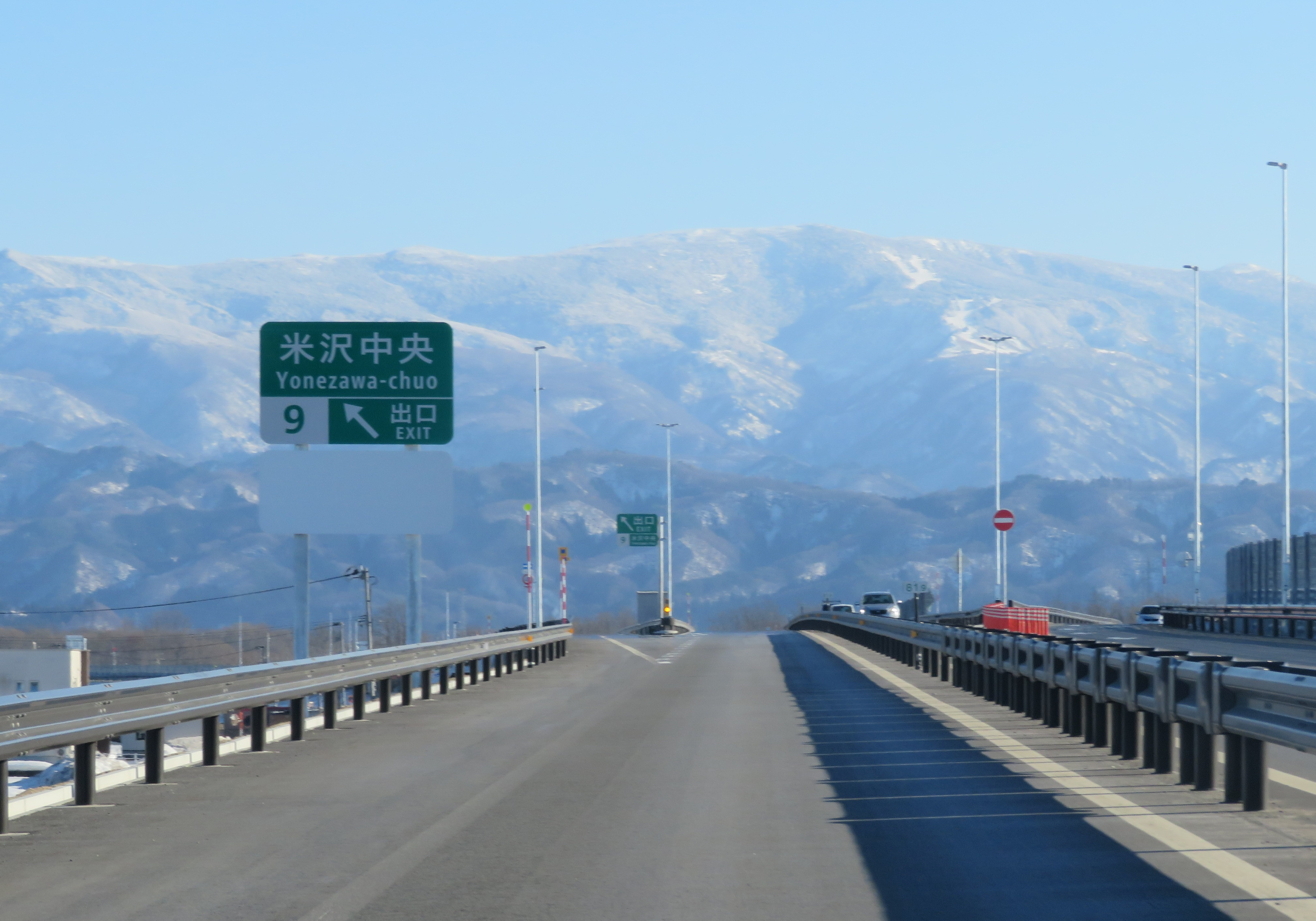 東北中央自動車道米沢中央インター出口付近（山形方面側から撮影）